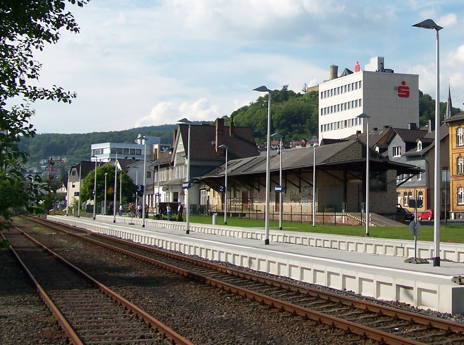 Bahnhofgebäude von Biedenkopf; im Vordergrund der ehemalige Güterbahnhof.